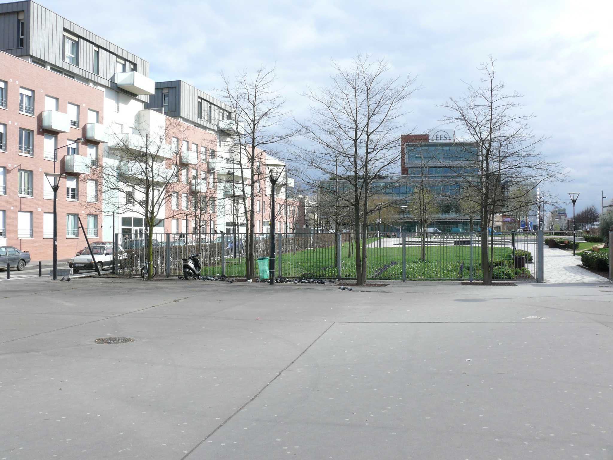 Le Square des Droits de l'Enfant à Saint-Denis (Seine-saint-Denis), dans le quartier de la Plaine Saint-Denis. Il est bordé par un immeuble d'habitation et on voit,au fond, le siège de l'établissement français du sang